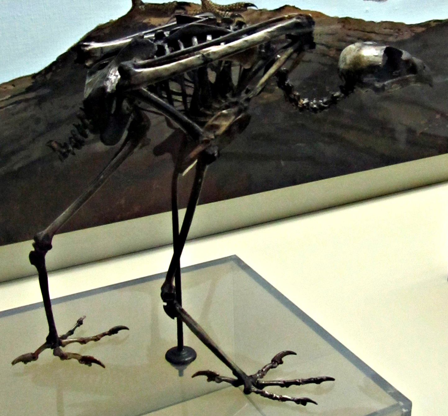 Extinct Polyborus prelutosus